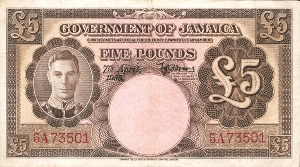 5 fontos jegy előoldala.